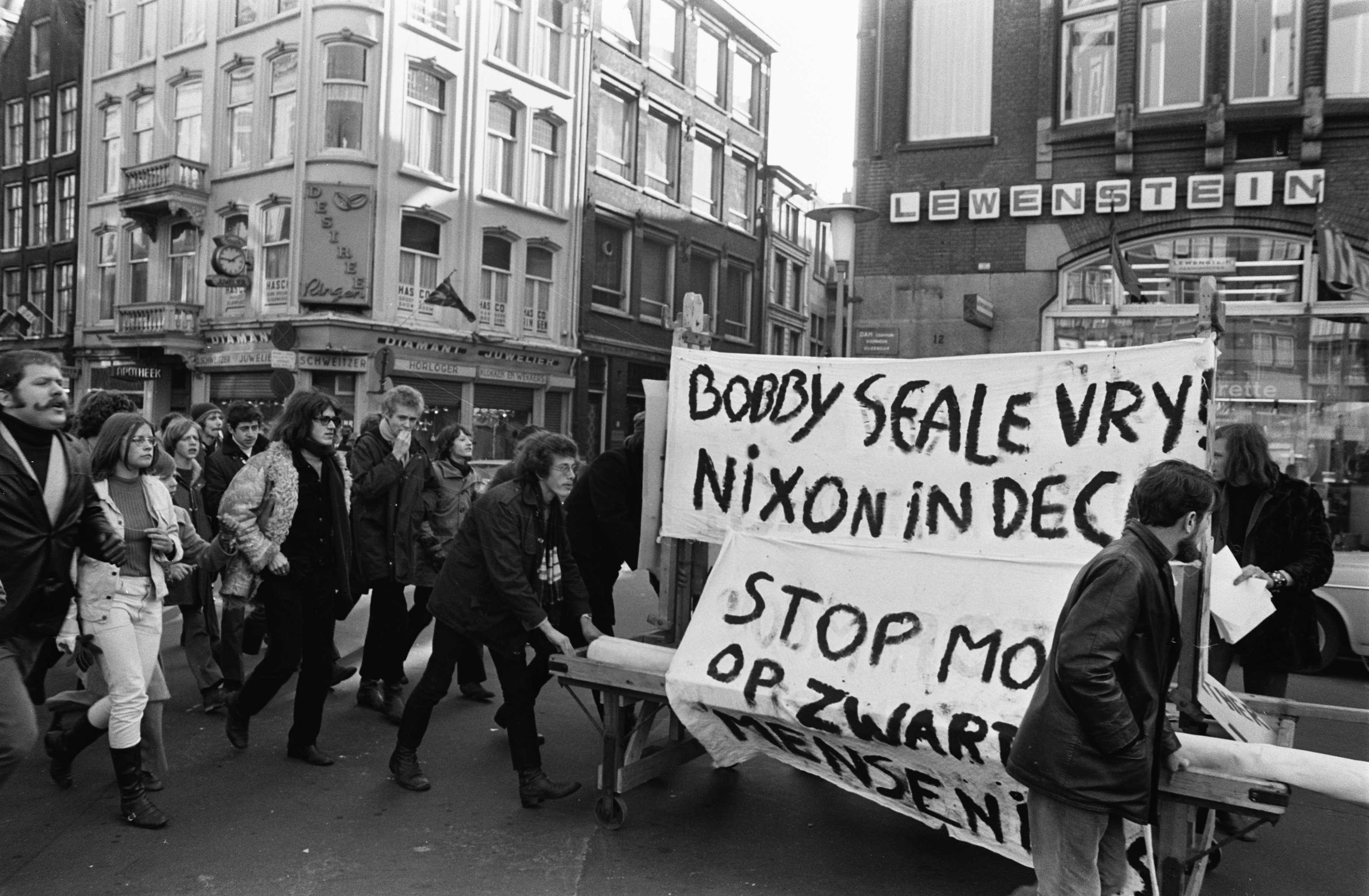 Collectie / Archief : Fotocollectie Anefo Reportage / Serie : [ onbekend ] Beschrijving : Demonstratie voor vrijlating van Zwarte Panter leider Bobby Seale in Amsterdam Datum : 14 maart 1970 Locatie : Amsterdam, Noord-Holland Trefwoorden : demonstraties, vrijlatingen Persoonsnaam : Bobby Seale Fotograaf : Evers, Joost / Anefo Auteursrechthebbende : Nationaal Archief Materiaalsoort : Negatief (zwart/wit) Nummer archiefinventaris : bekijk toegang 2.24.01.05 Bestanddeelnummer : 923-3470